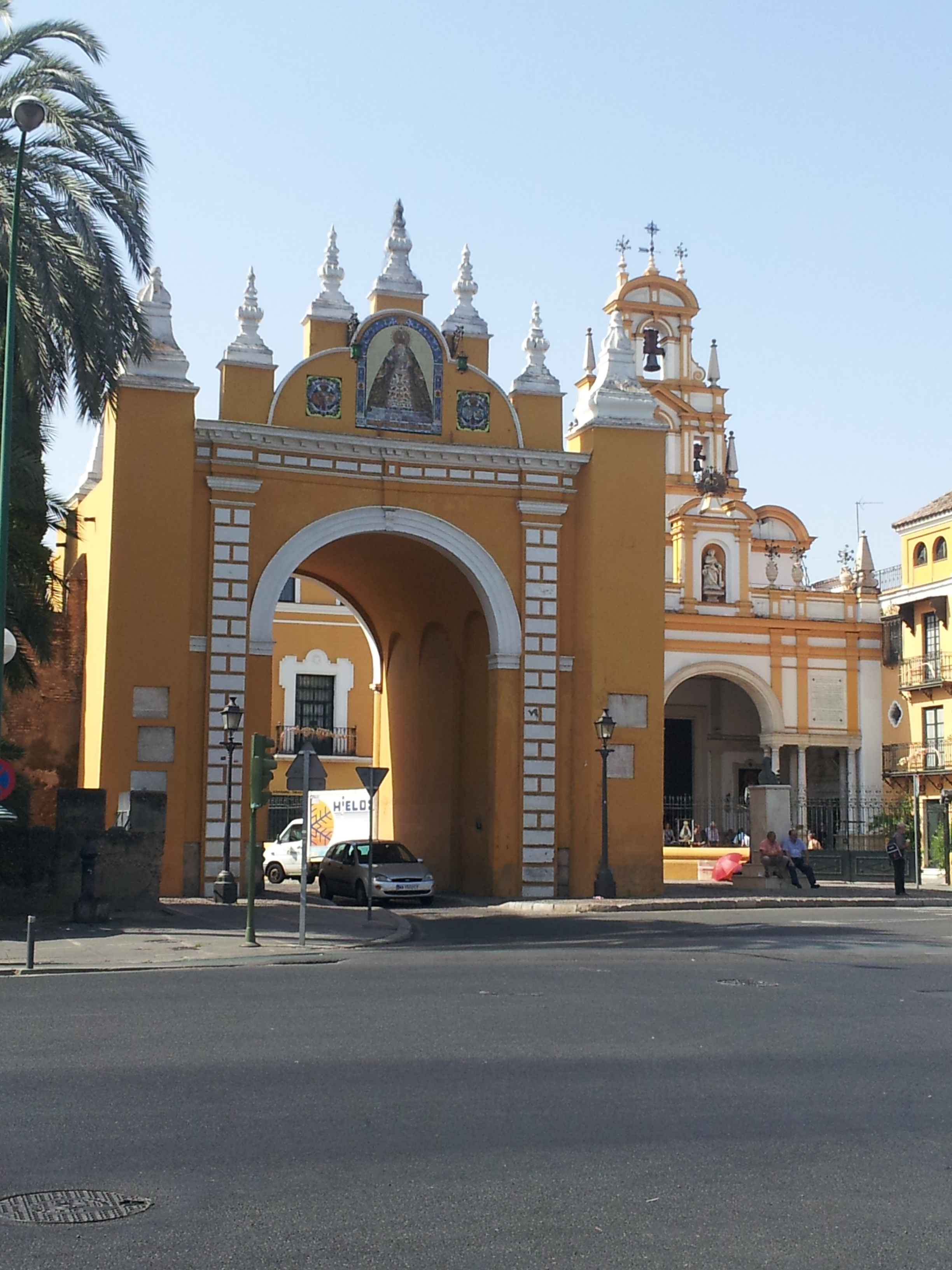 Puerta de la Macarena y Basilica de la Macarena